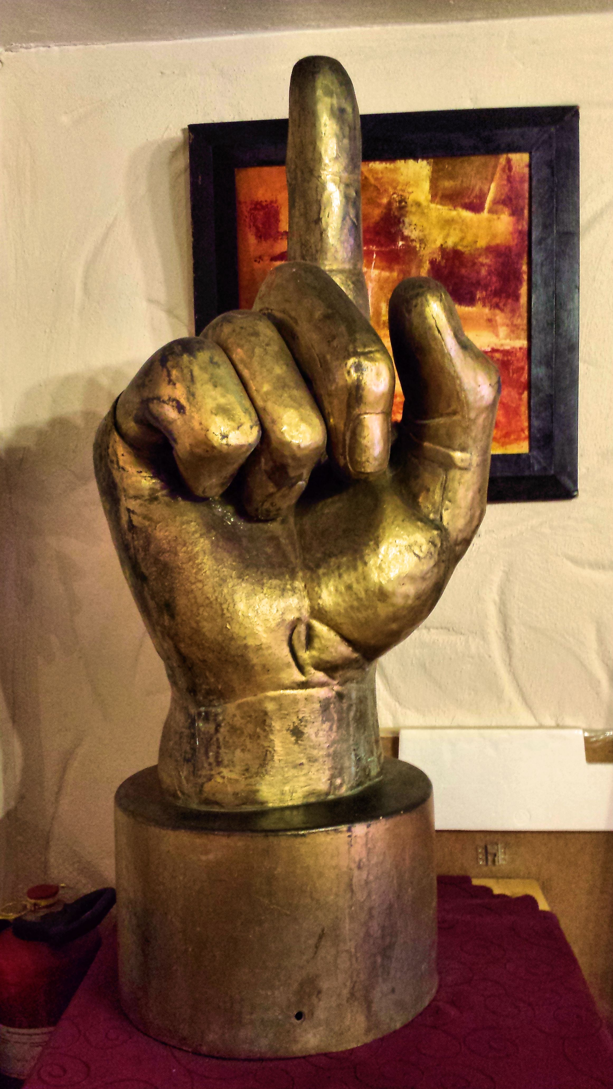 Mahnhand